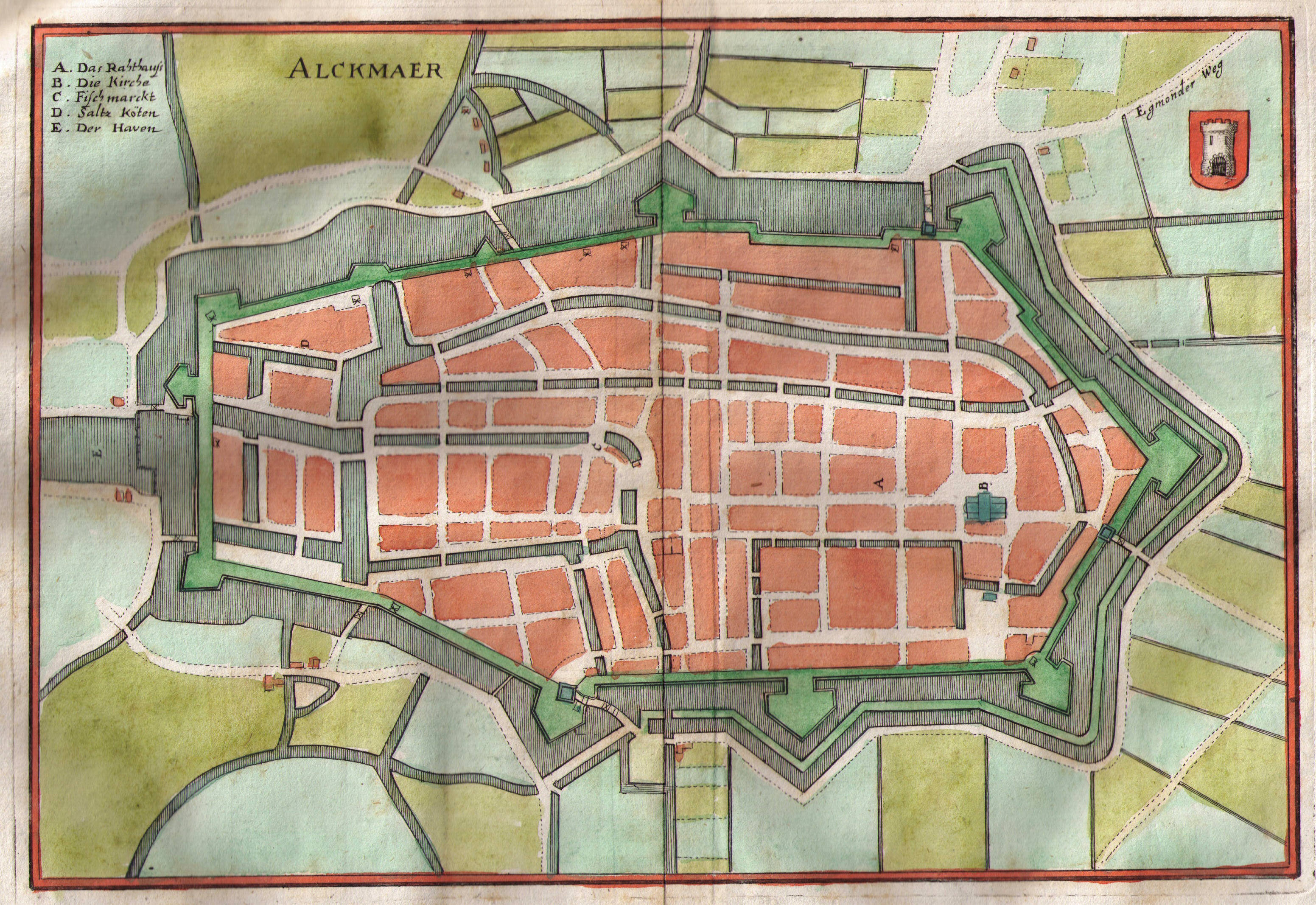 Title:Alckmaer; 25.5 x 17.5 cm